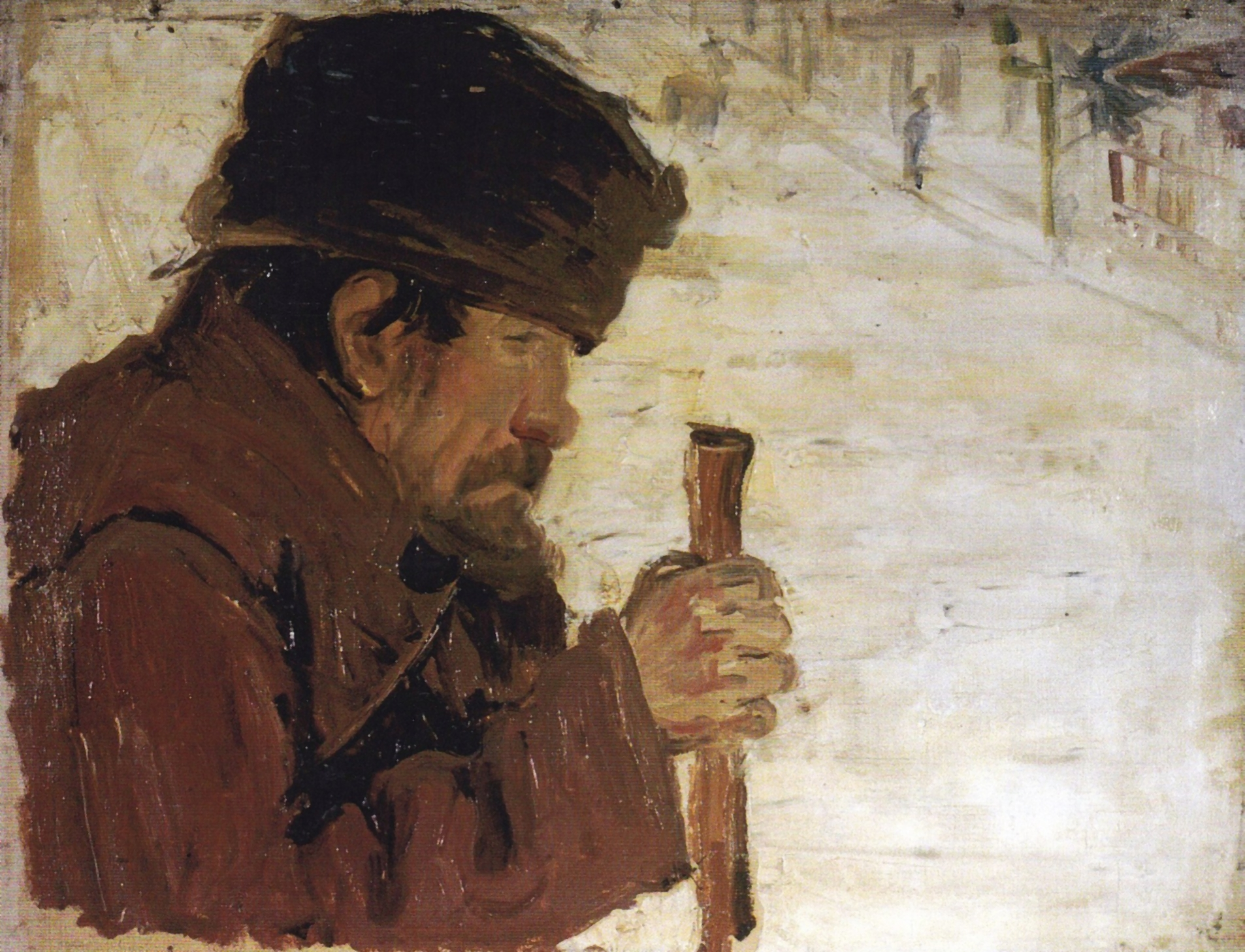 Bătrânul Lumânărică